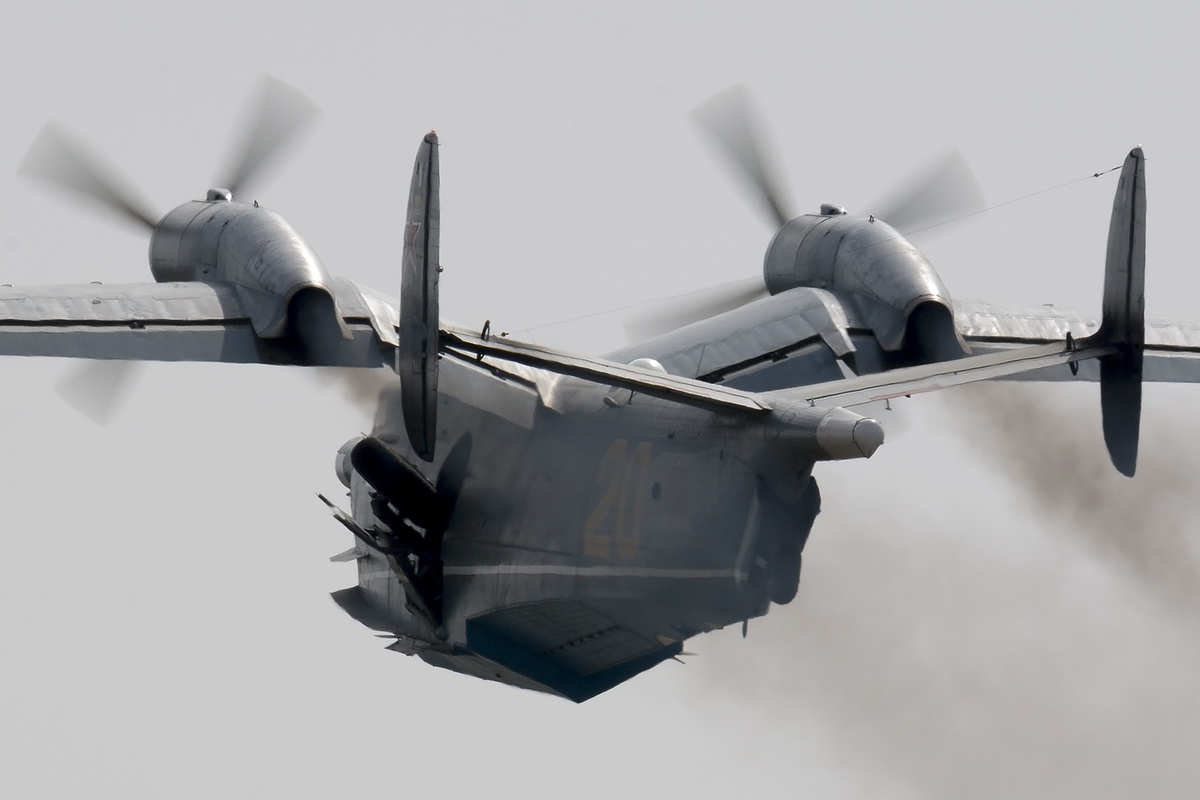 Beriev Be-12PS "Chayka"